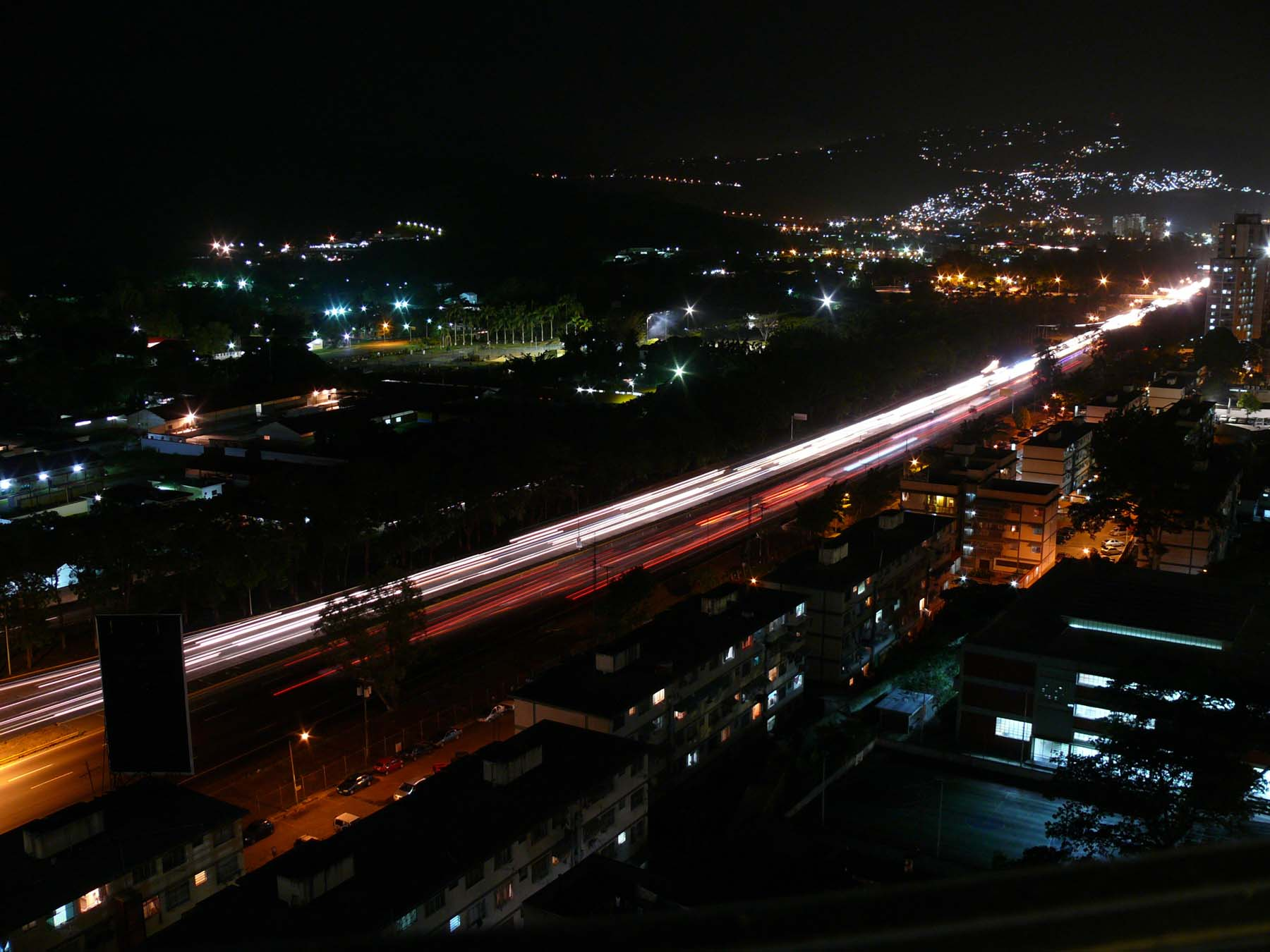 Autopista Valle-Coche de noche